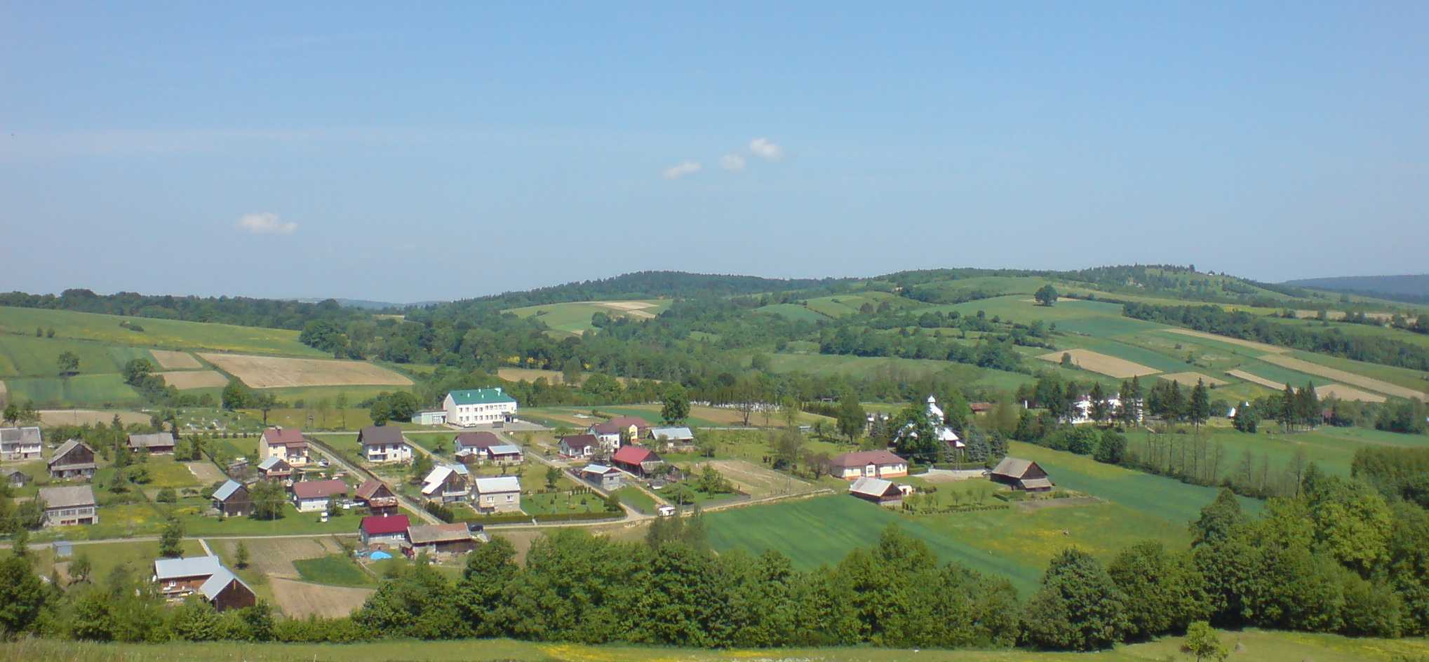 Końskie